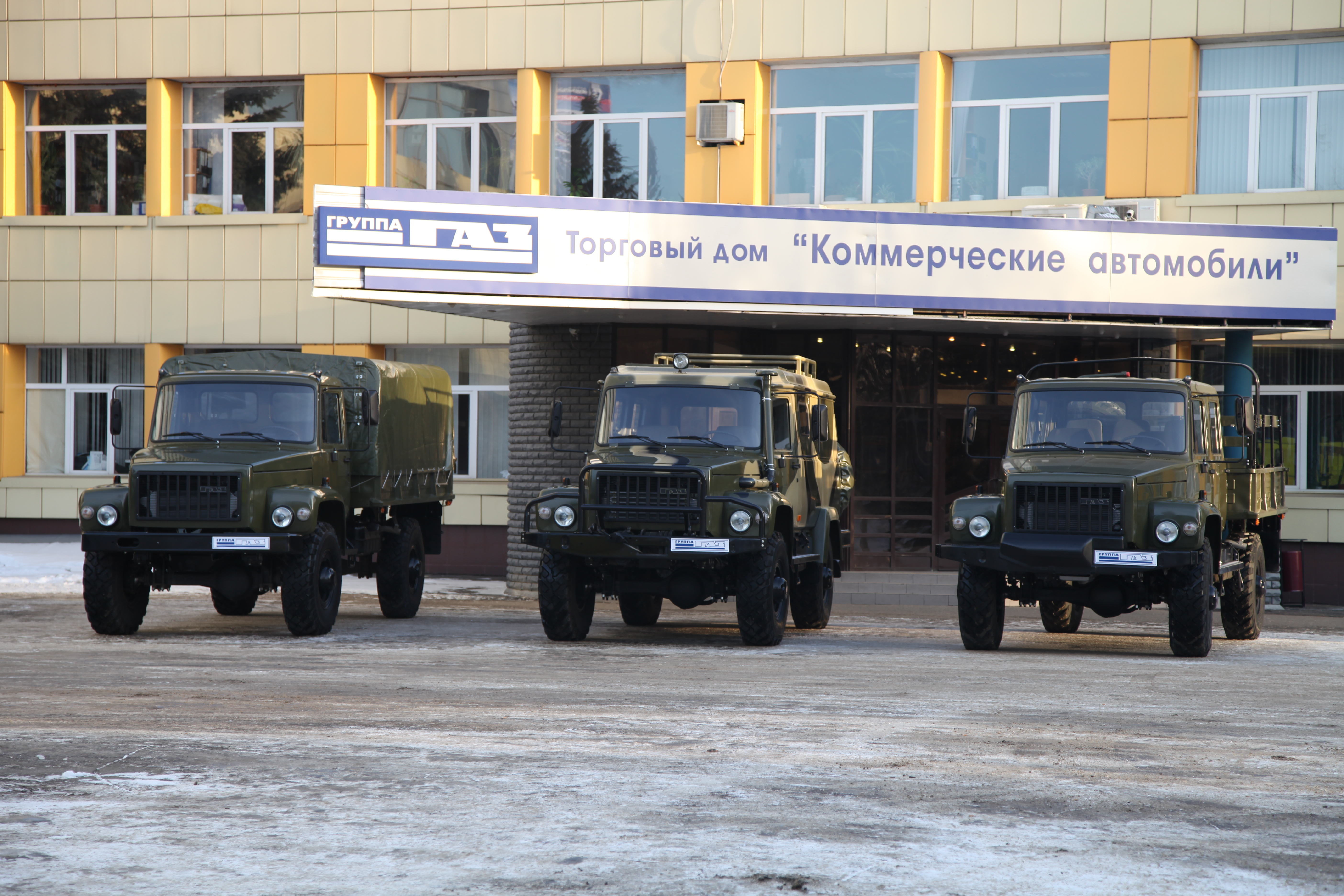 ГАЗ-33088 Садко, ГАЗ-330811 Вепрь и ГАЗ-33081 Егерь со сдвоенной кабиной (GAZ-33088 Sadko, GAZ-330811 Vepr and GAZ-33081 Eger)